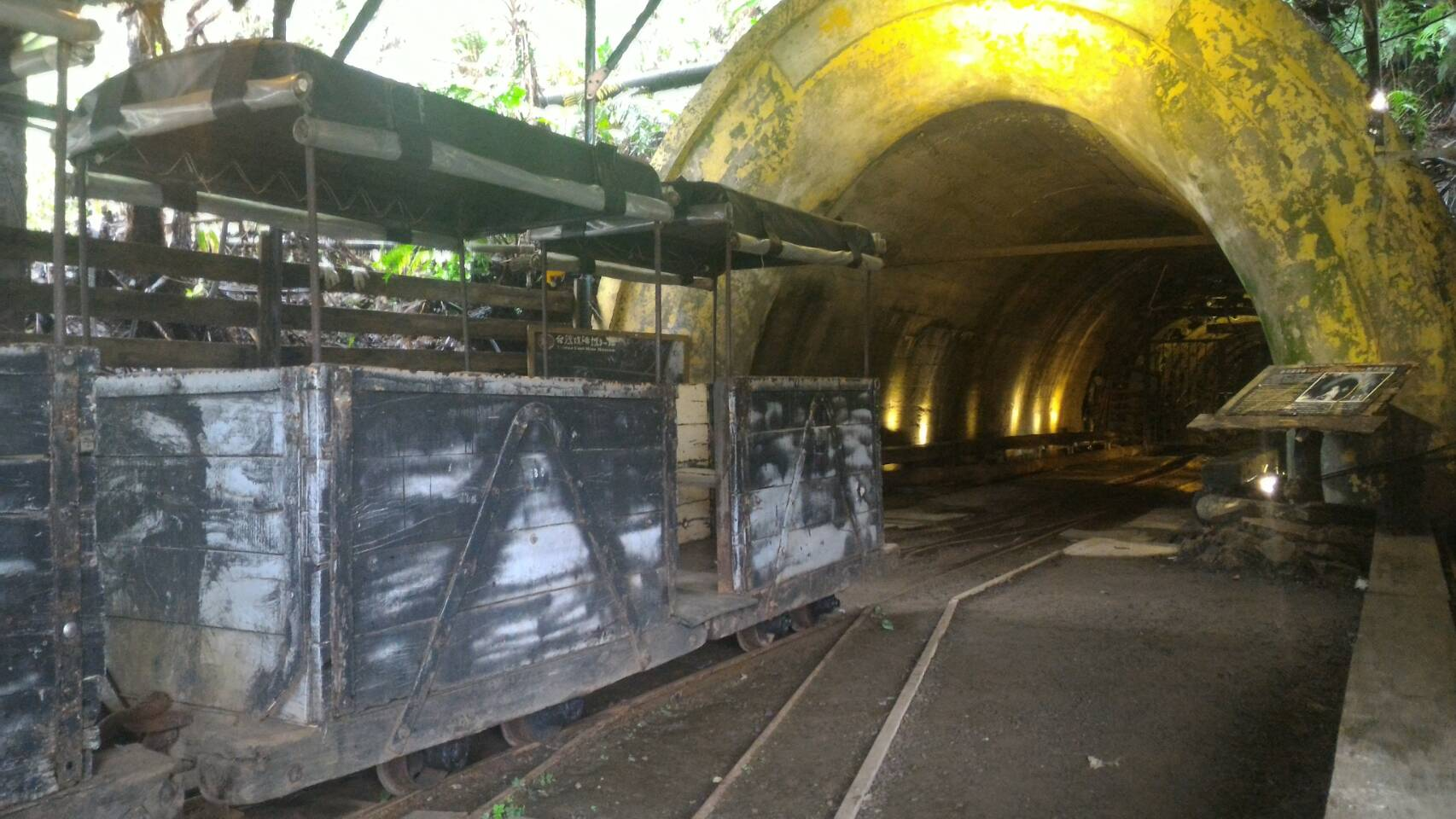 煤礦坑口入口處